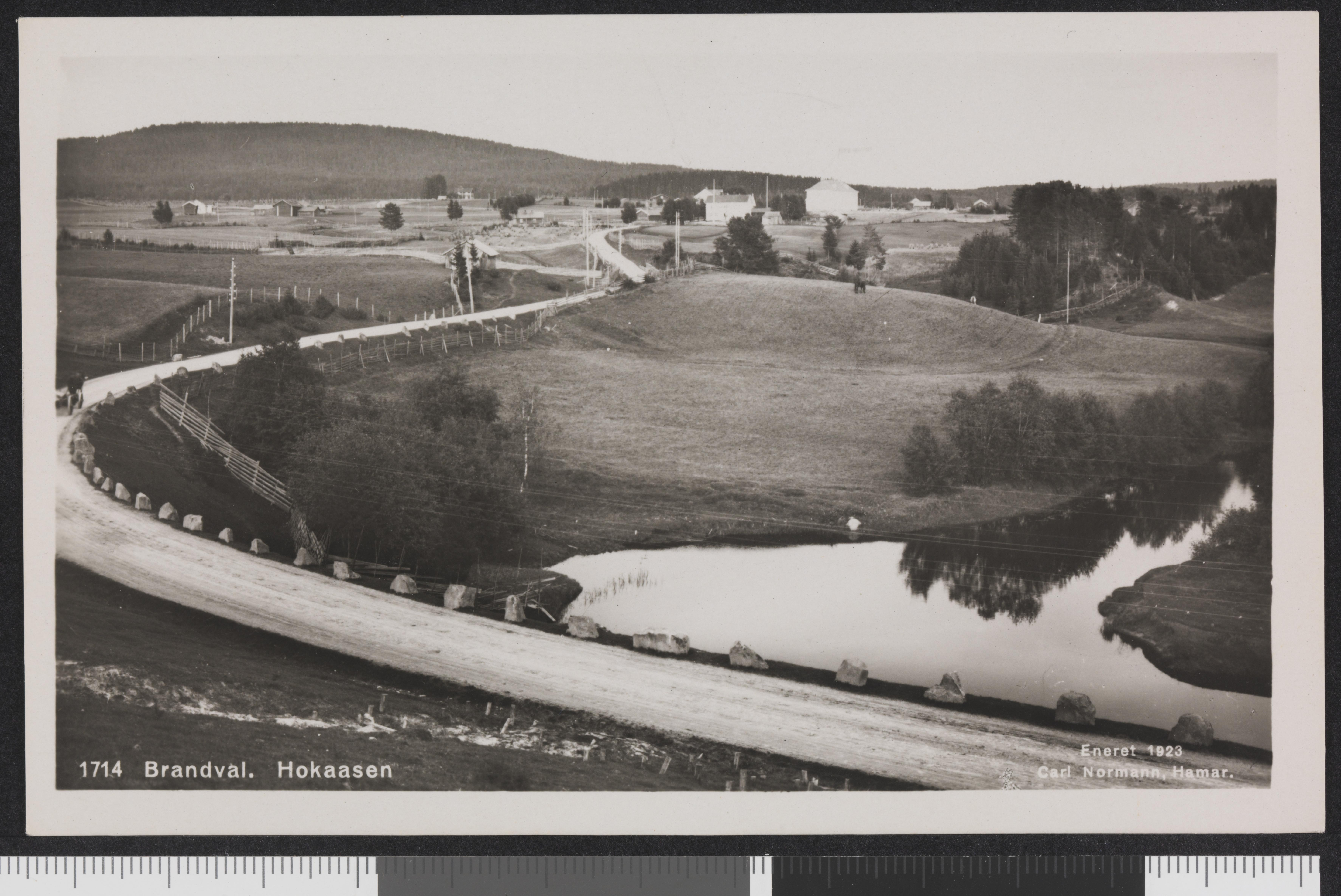 Bildet er hentet fra Nasjonalbibliotekets bildesamling Brandval,Hokåsen, Kongsvinger, Hedmark